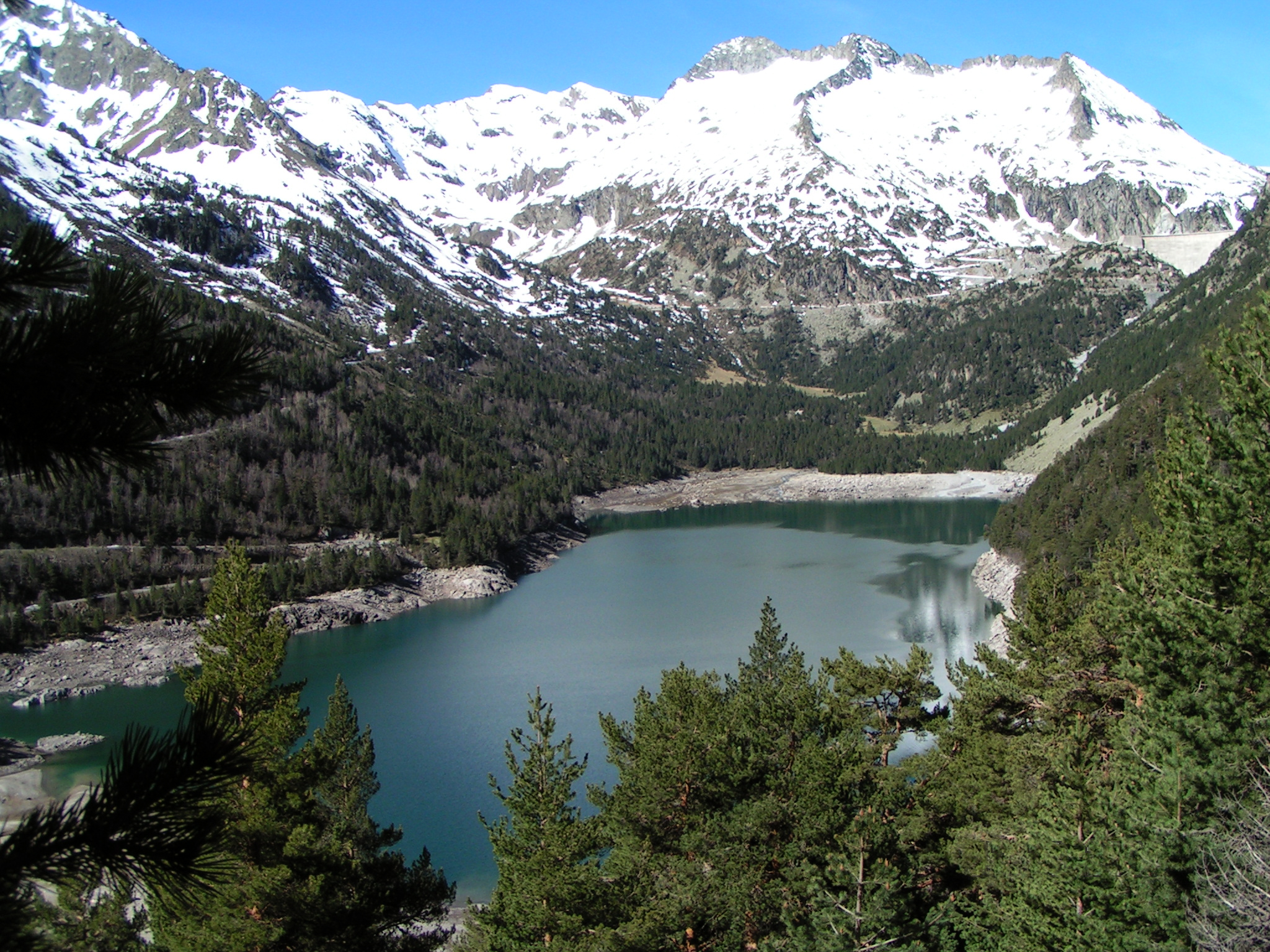 Lac d'Orédon Pyrénées France